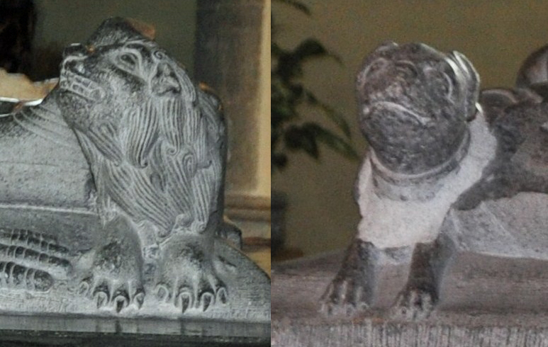 Détail du mausolée de Jean III de Trazegnies et de son épouse Isabeau de Werchin(Sur les tombeaux du moyen-âge, un chien couché aux pieds d'une dame mariée est l'emblème de sa fidélité ; un lion est aux pieds de son époux, indique sa force)